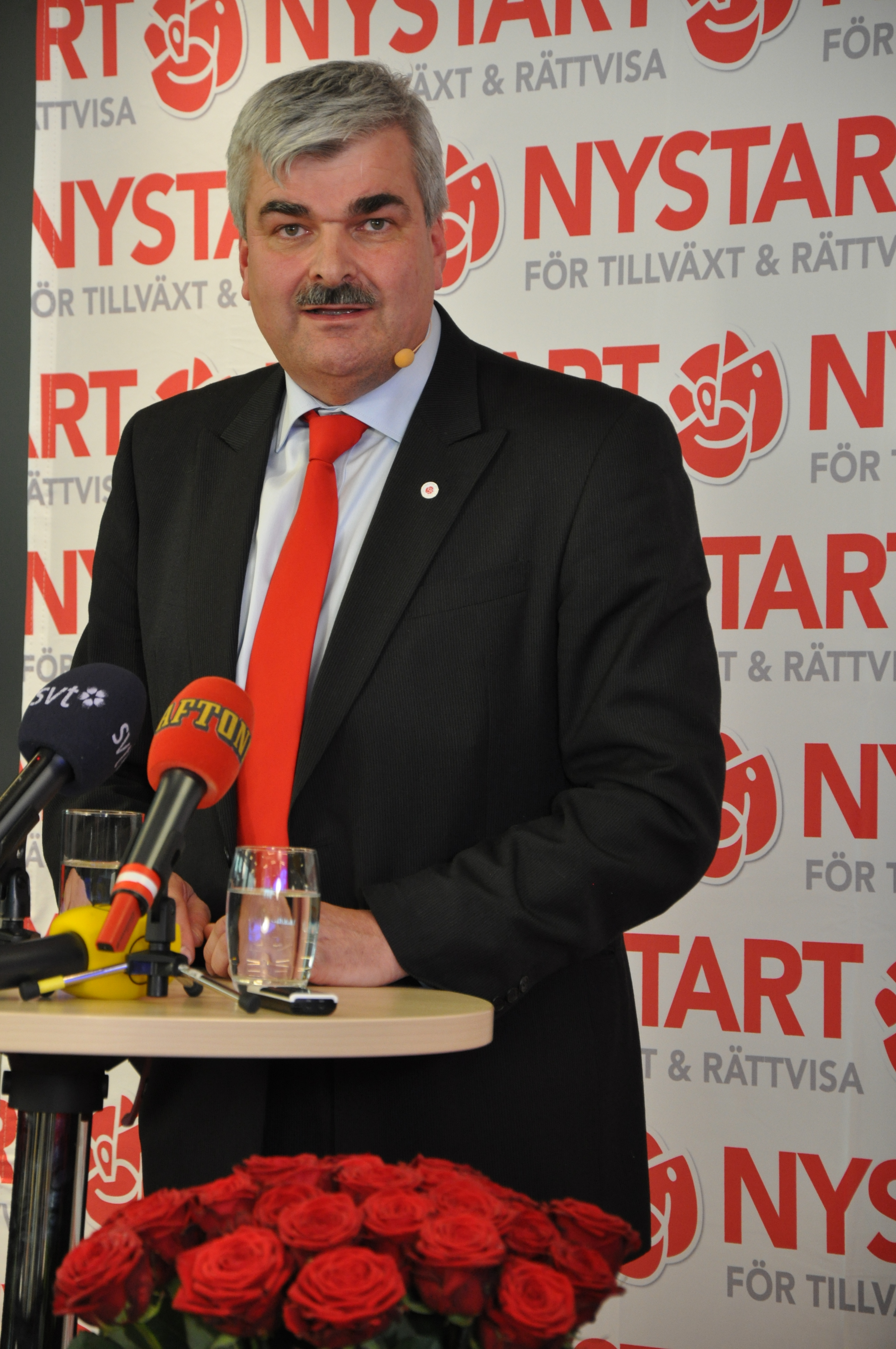 Håkan Juholt på presskonferens, direkt efter att han blivit vald till partiordförande